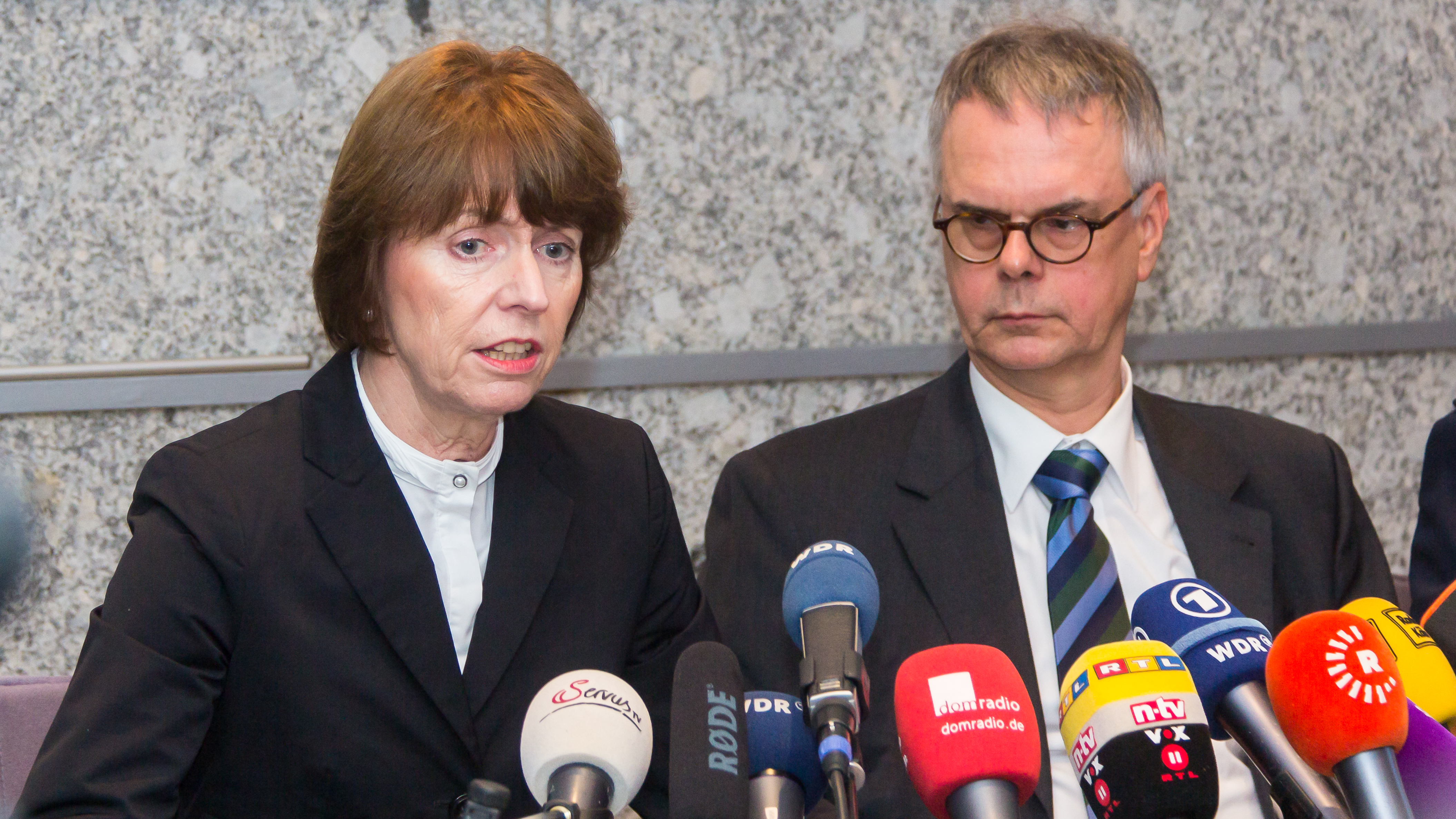 Pressekonferenz im Rathaus Köln zu den Vorgängen in der Silversternacht 2015/16 Foto: Oberbürgermeisterin Henriette Reker, Polizeipräsident Wolfgang Albers